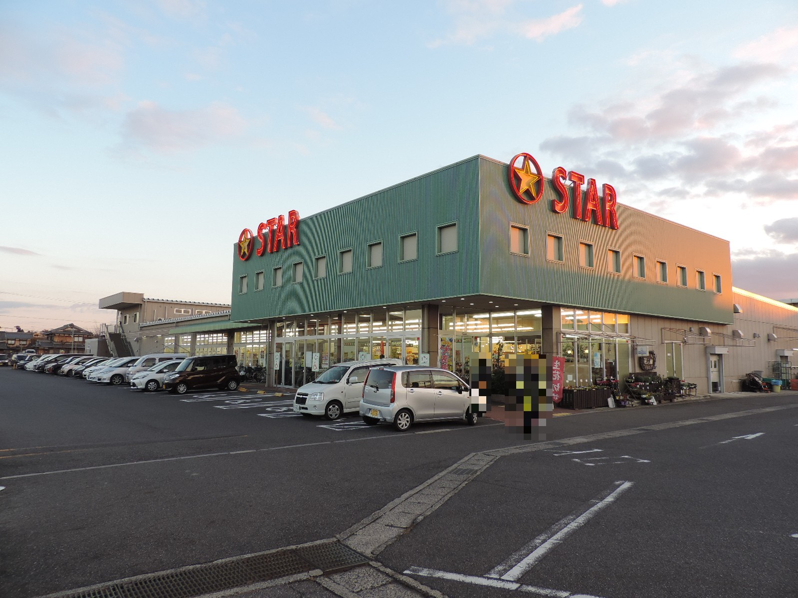 スーパーマーケットスター栗東辻店（2017年撮影）